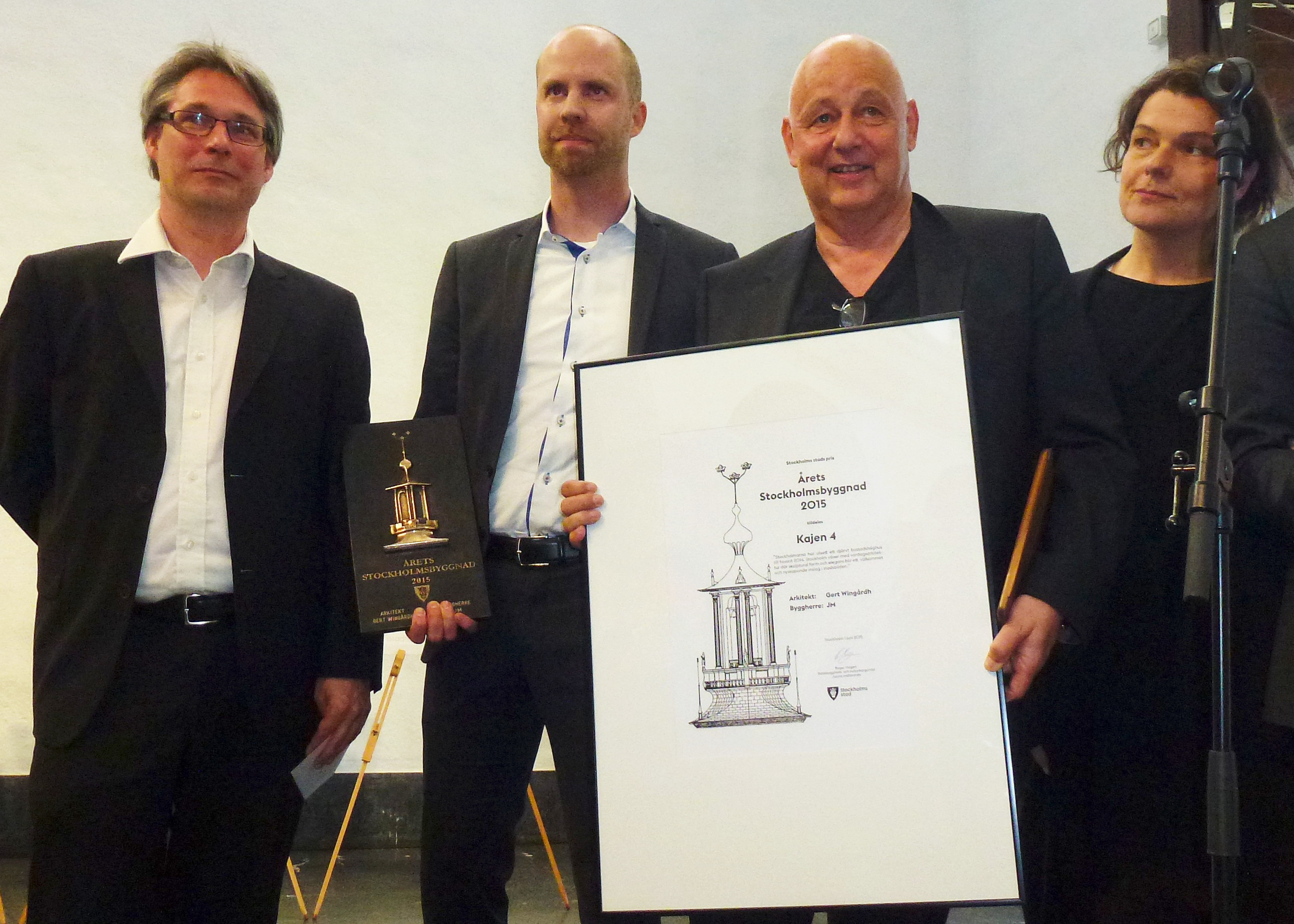 Årets Stockholmsbyggnad vinnare 2015, Gert Wingårdh med Kajen 4. Fr.vä. Roger Mogert (stadsbyggnads- och kulturborgarråd), Pär Vennerström (JM), Gert Wingårdh (vinnande arkitekt), Karolina Keyzer (Stockholms stadsarkitekt)